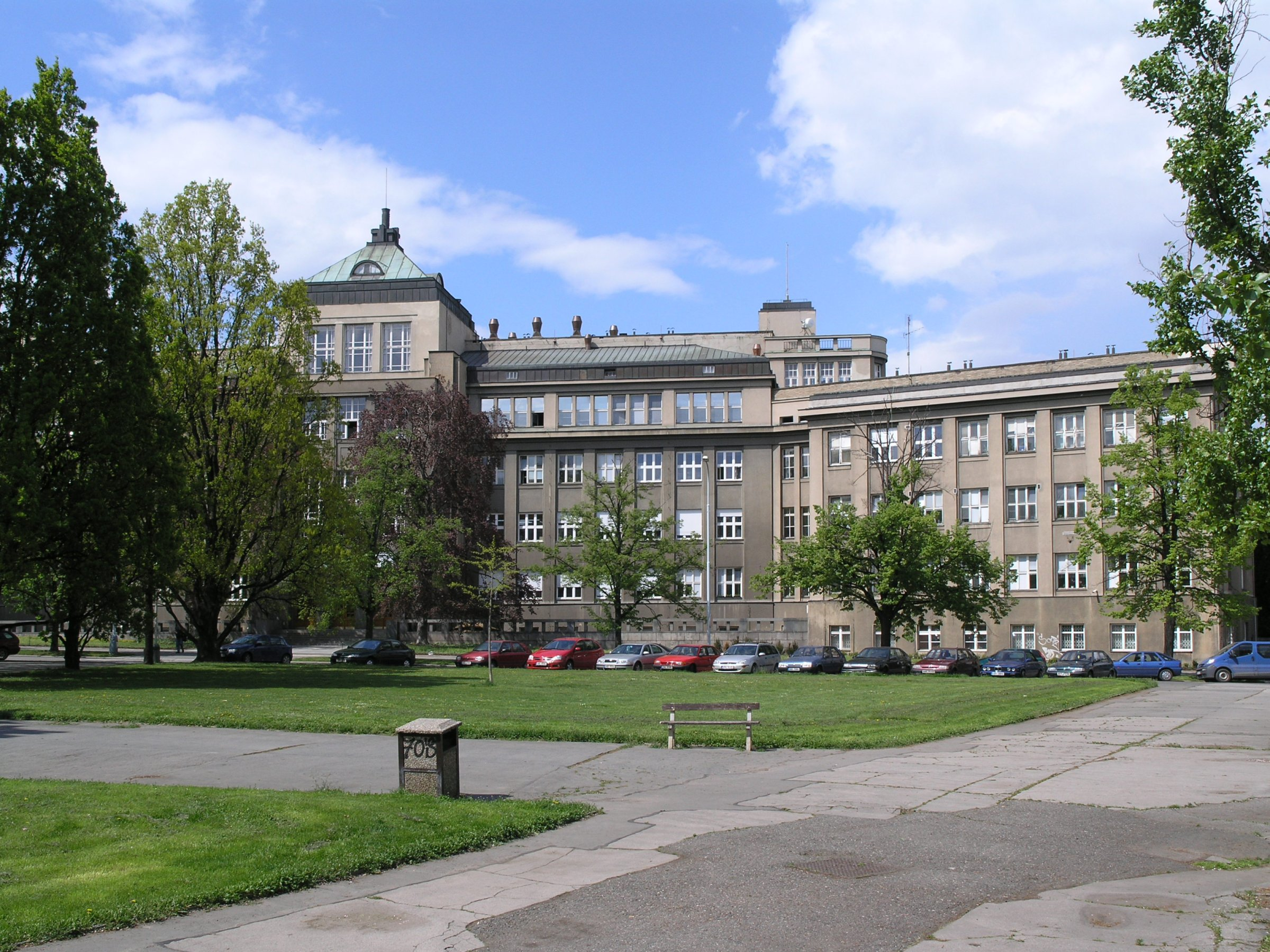 Praha, Dejvice - Flemingovo náměstí (budova Akademie věd ČR)